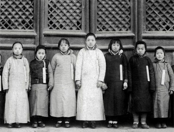 图为列队待选的正黄旗秀女